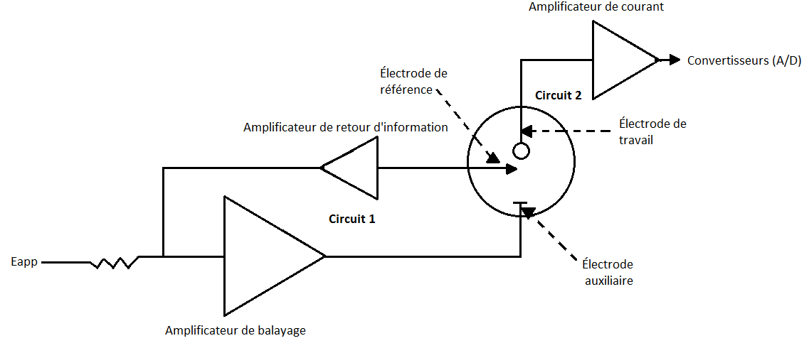 Schéma du système de circuits dans l'appareil de polarographie